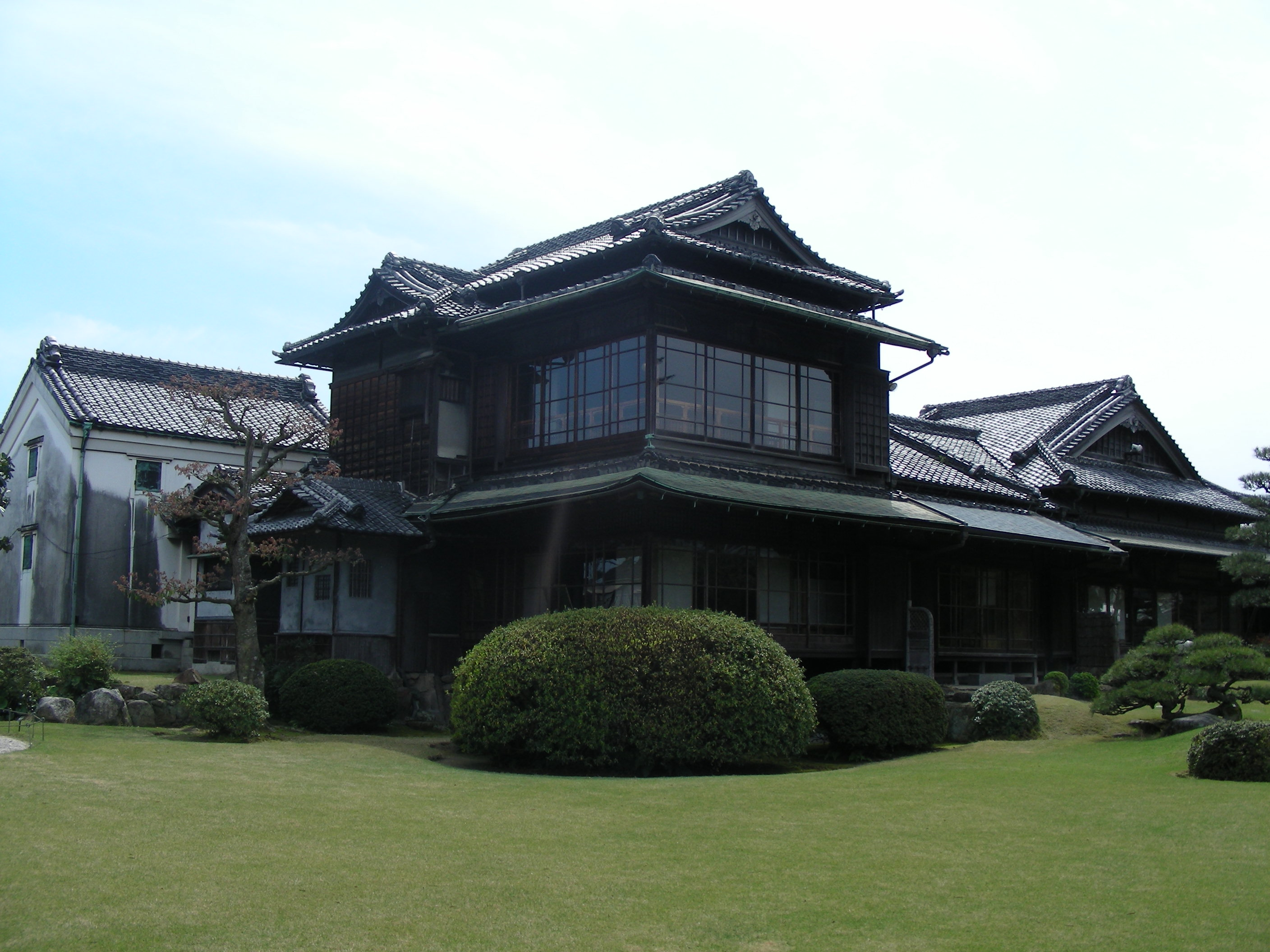 福岡県飯塚市幸袋の旧伊藤伝右衛門邸。2014年4月撮影。